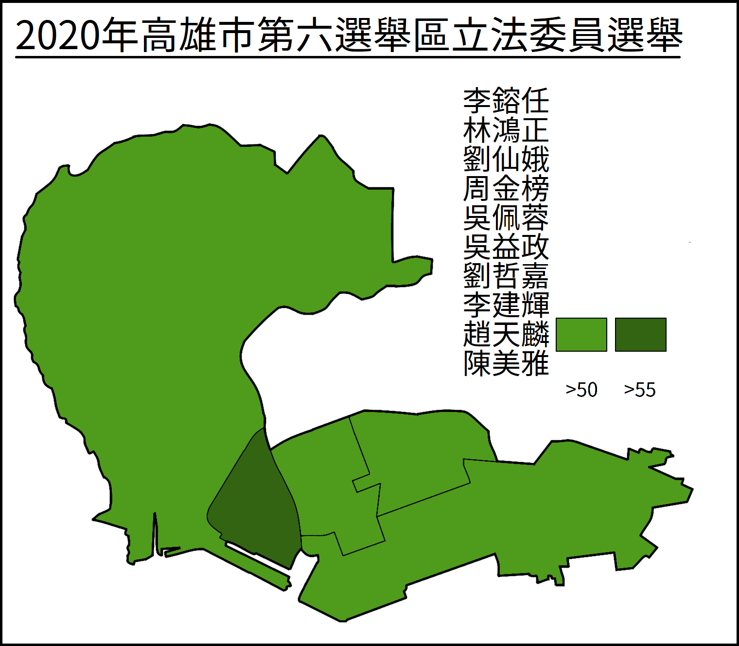 2020年立法委員選舉高雄市第六選區得票